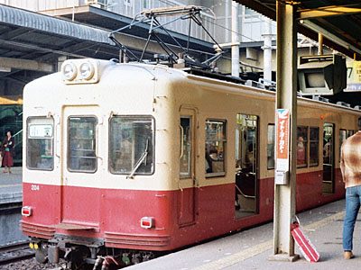 新京成 204 1982年2月頃 松戸駅